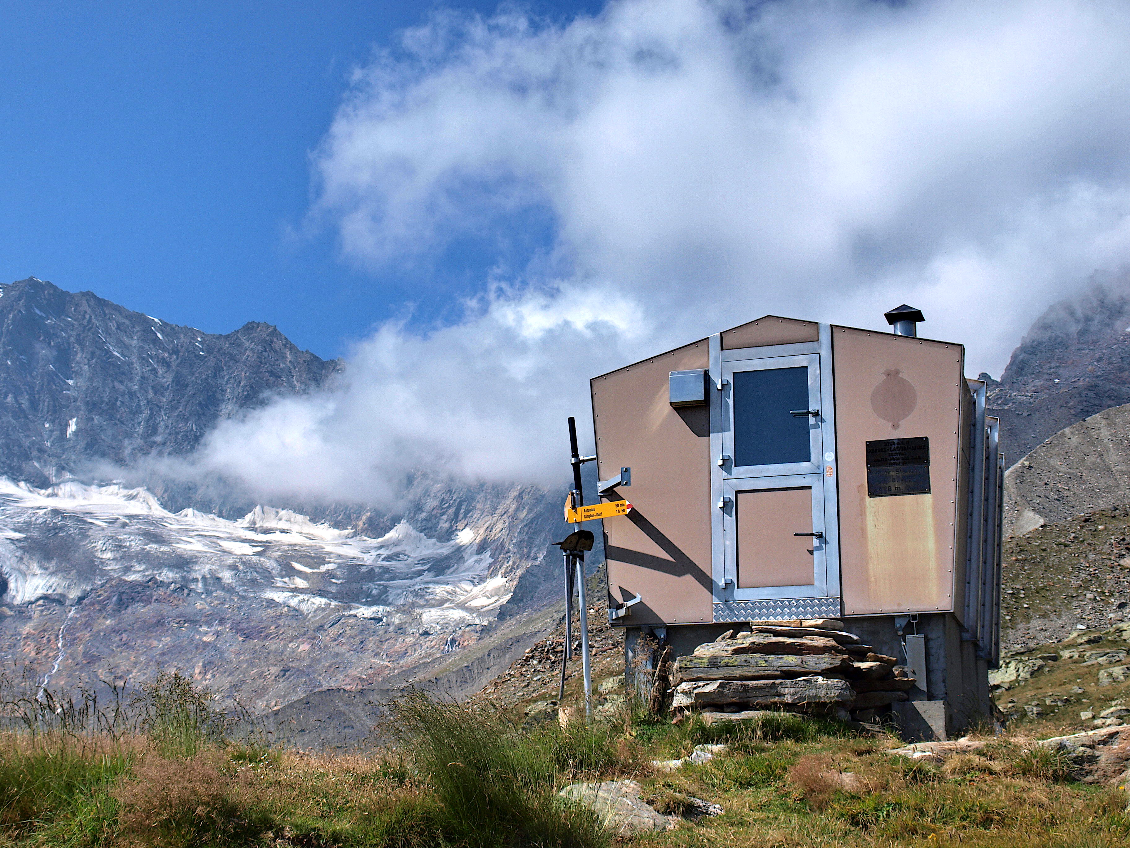 Laggin Biwak